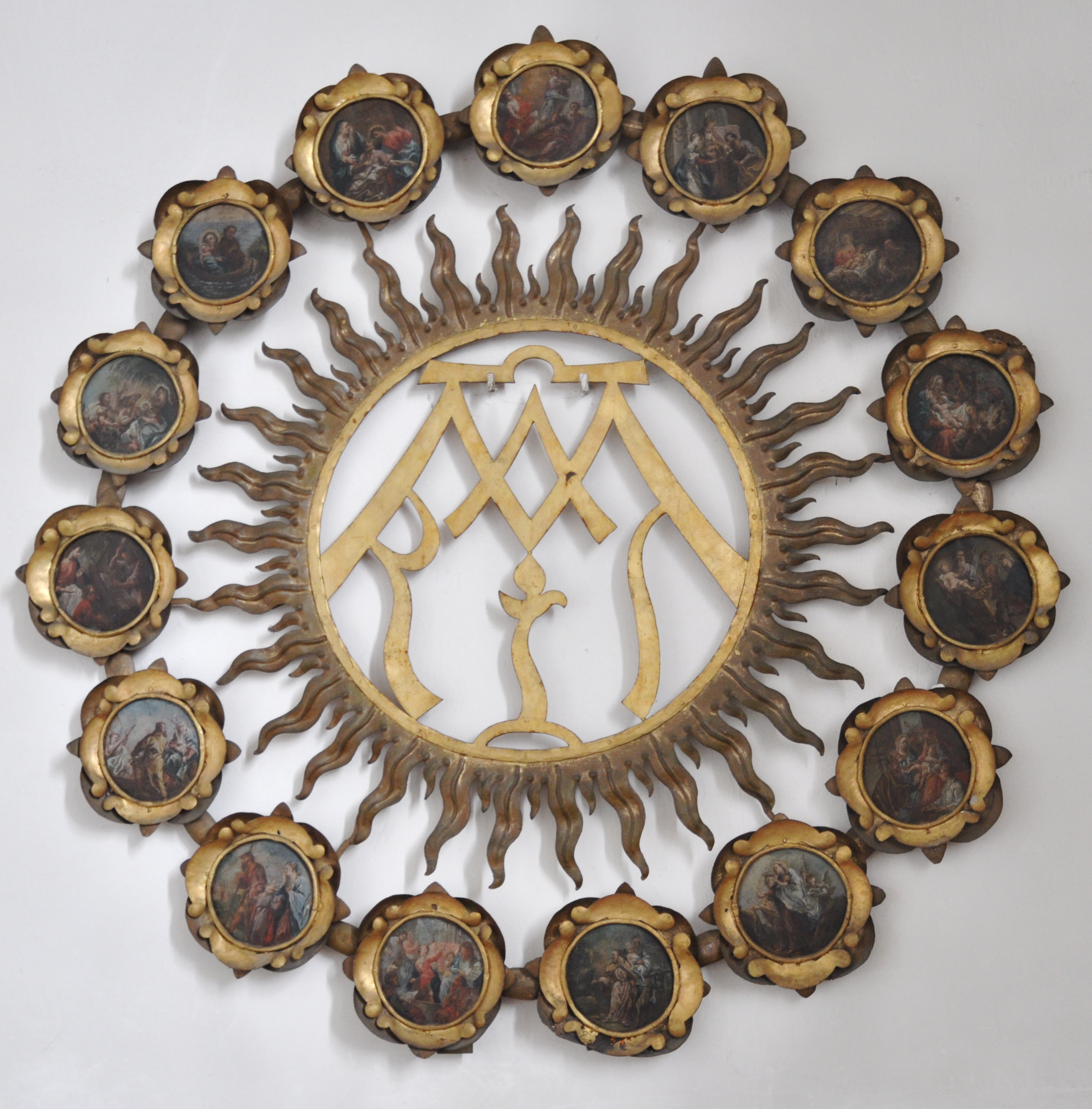 Bad Waldsee, Reute, Kloster- und Pfarrkirche St. Peter und Paul, Rosenkranzmedaillons